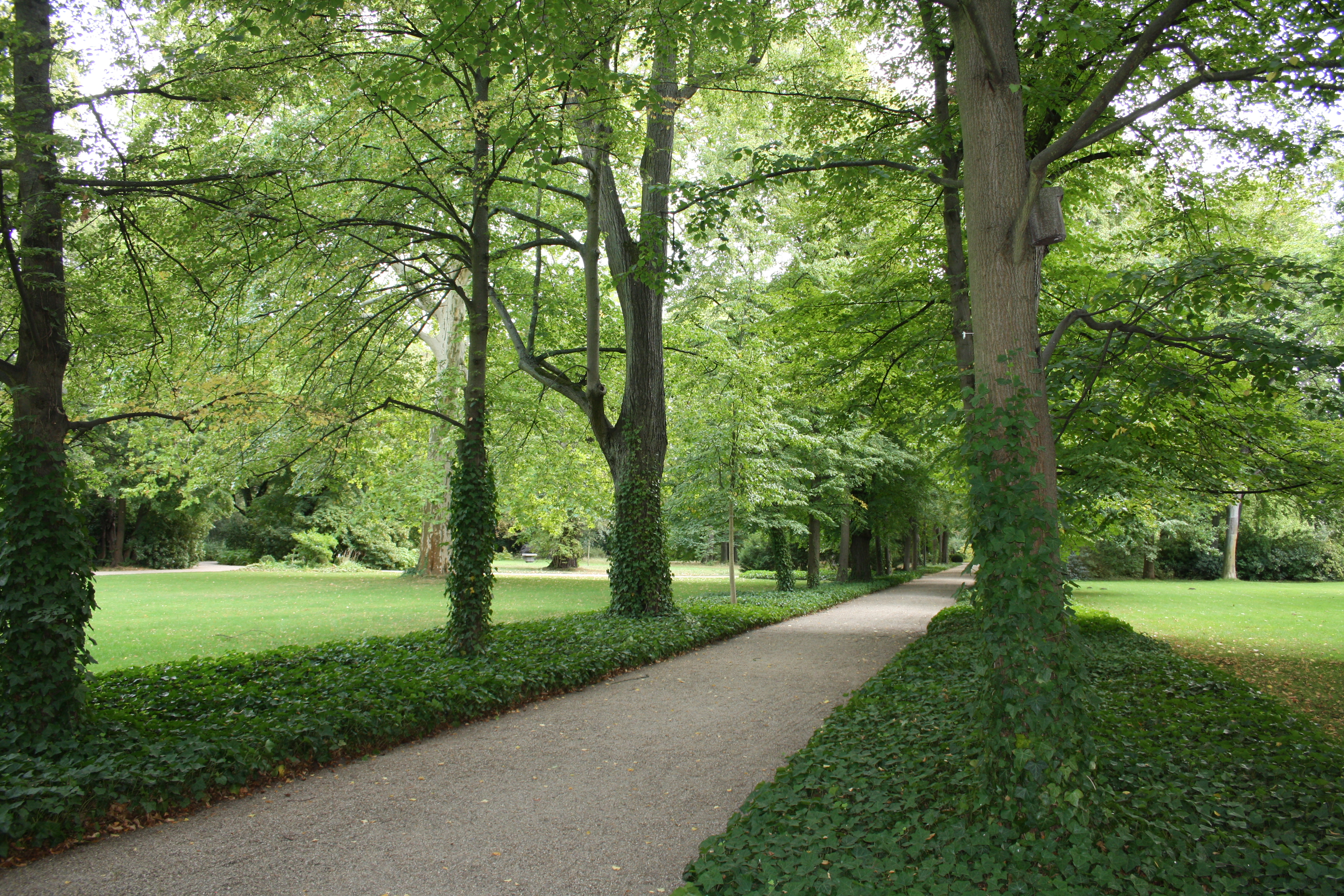 Schloss Britz Gutspark